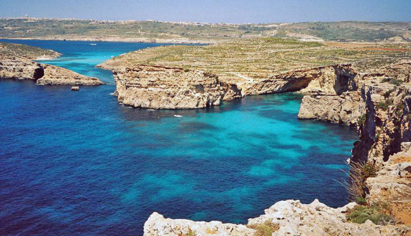 Blo Lagun op Comino.